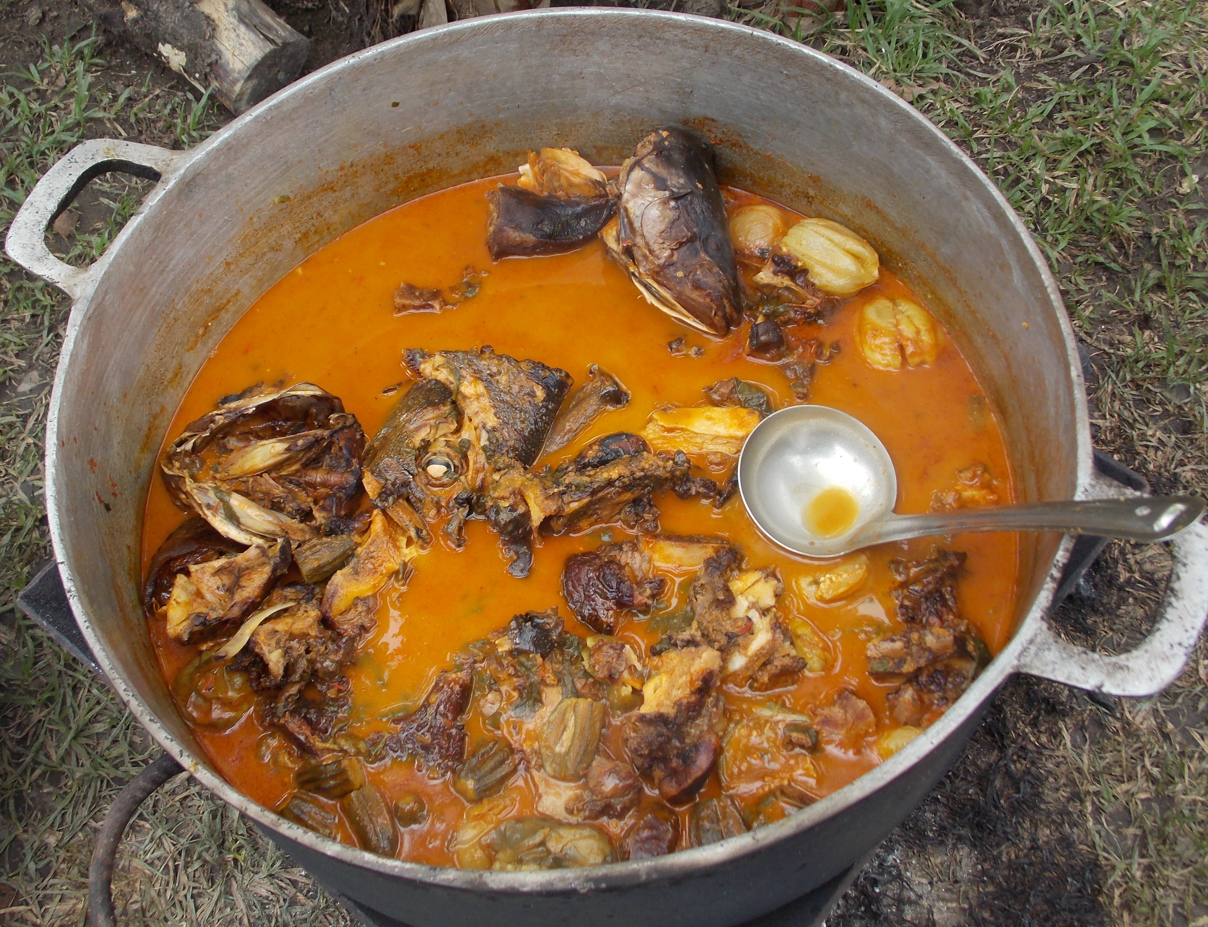 Sauce à base d'aubergine communément appelée "sauce claire". Ici, c'est préparée avec du poisson. This is an image of food from Côte d'Ivoire